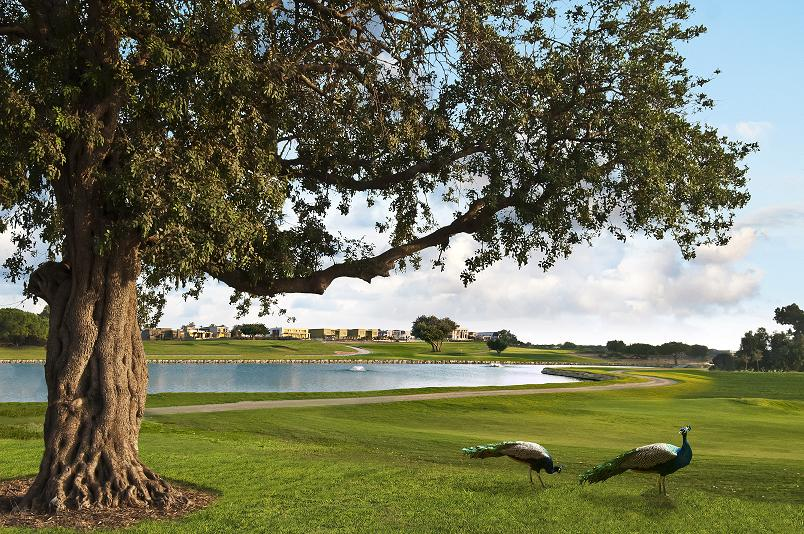 מבט על גומה 7 במועדון הגולף בקיסריה